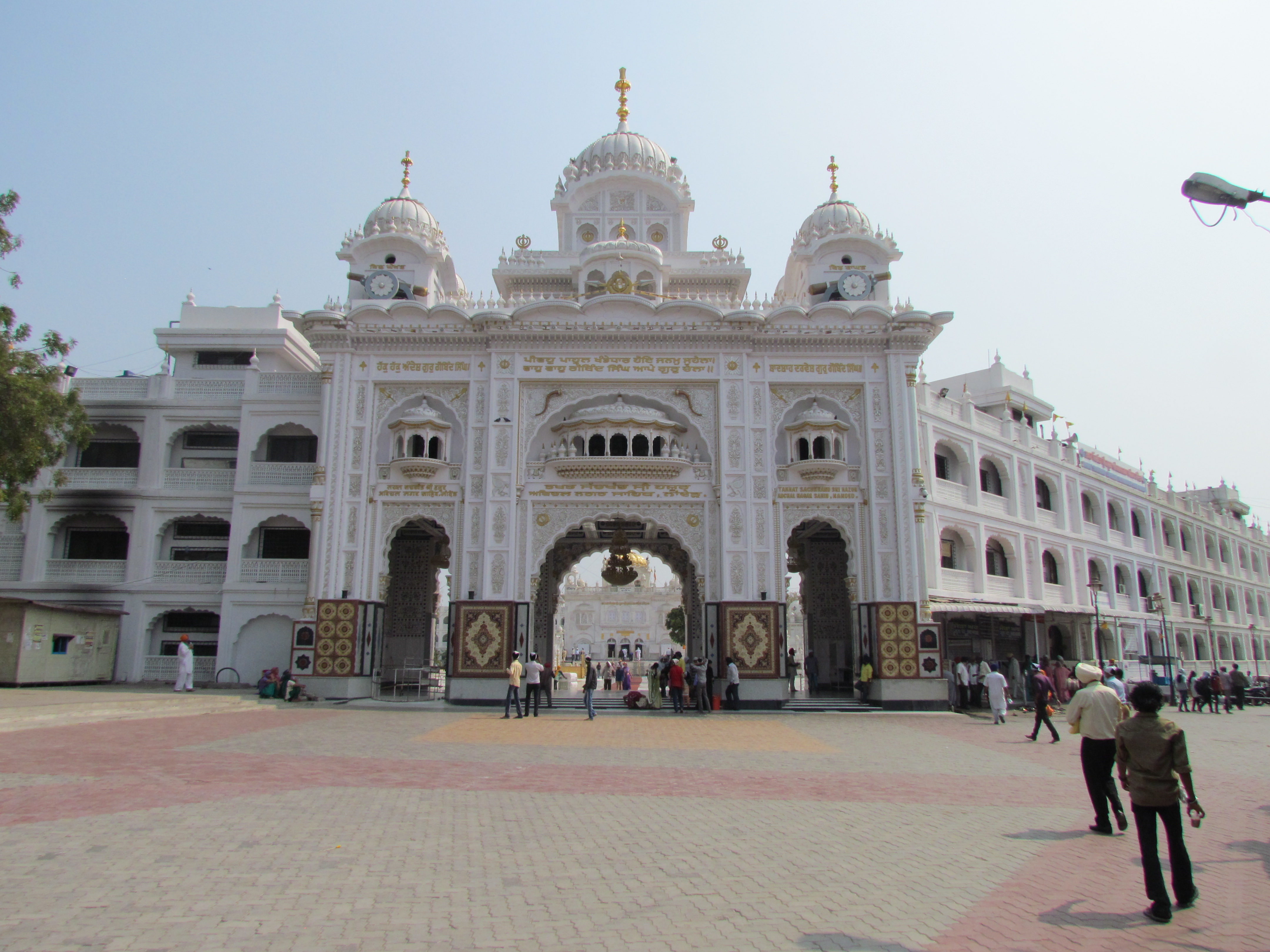 Sharda Nagar, Hyder Bagh, Dashmesh Nagar, Harsh Nagar, Nanded, Maharashtra, India